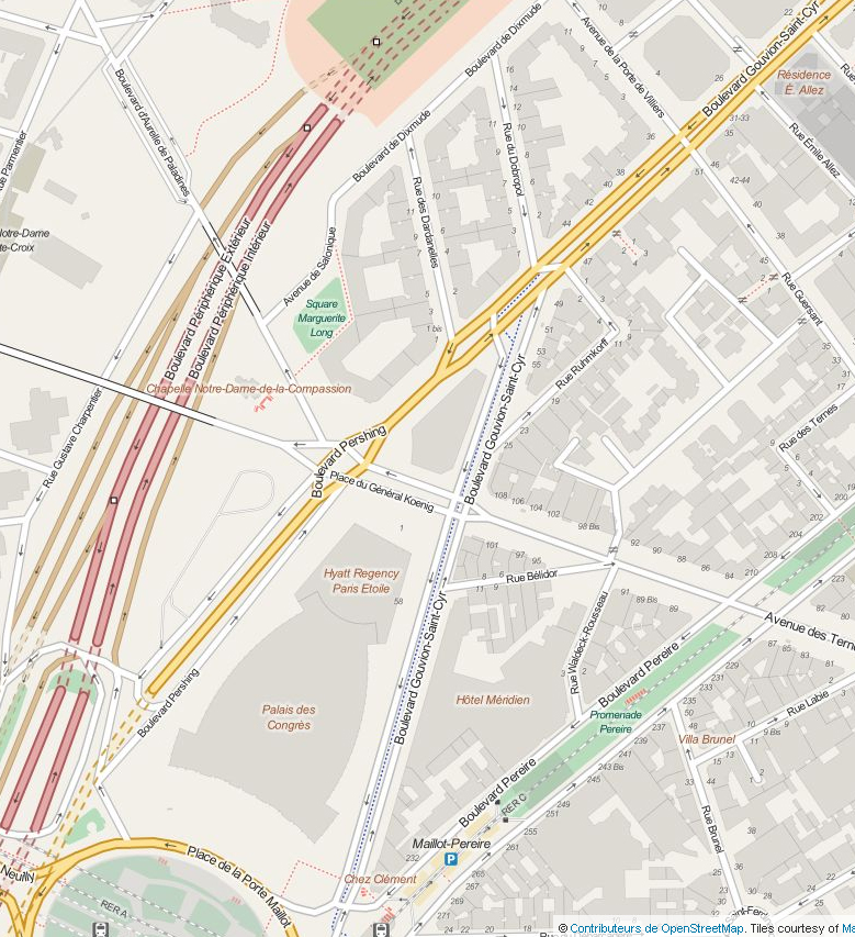 Openstreet map « © les contributeurs d’OpenStreetMap ». extrait plan Paris et Neuilly boulevard Pershing et Gouvion-Saint-Cyr